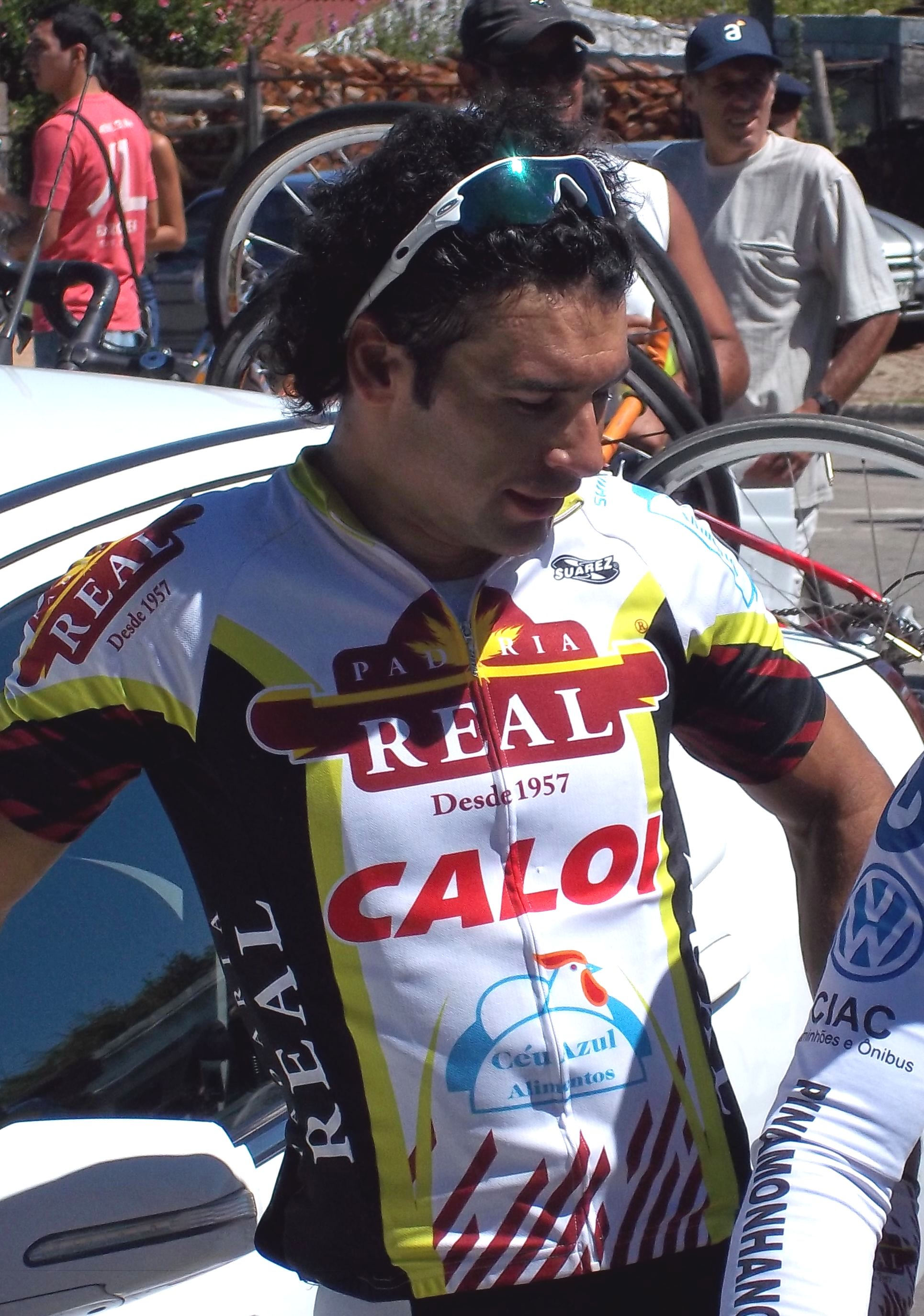 Ciclista argentino Frncisco Chamorro, con el maillot del equipo Real Cycling Team